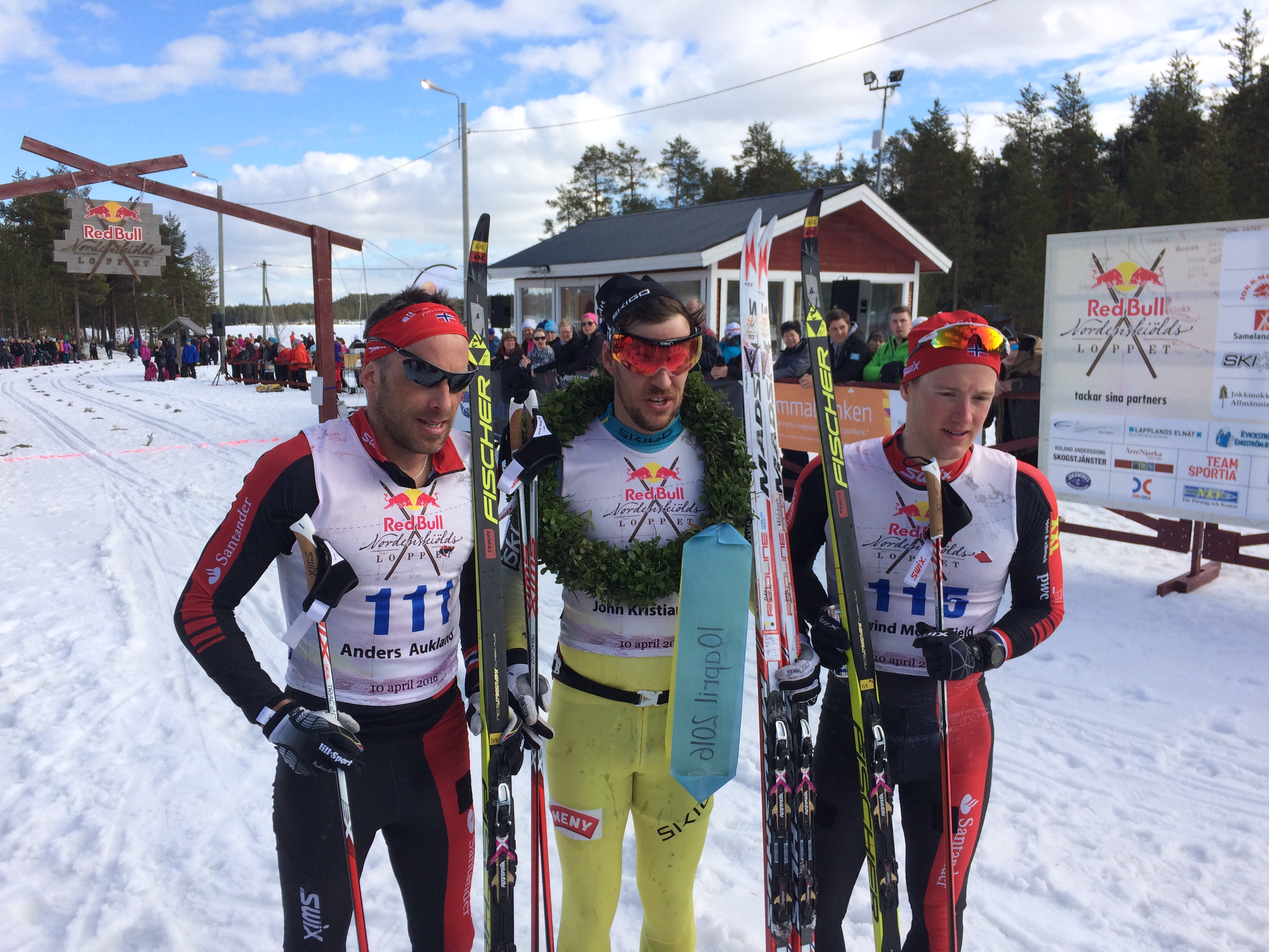 Red Bull Nordenskioldsloppet 2016: Anders Aukland (2.), John Kristian Dahl (1.), Øyvind Moen Fjeld (3.)